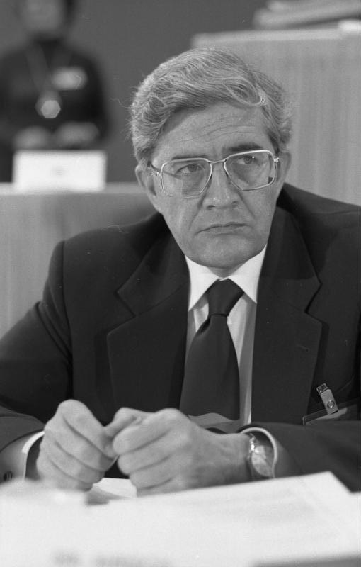 28. Ordentlicher Bundesparteitag der FDP in der Kieler Ostseehalle. (Burkhard Hirsch) 6.-8.11.1977